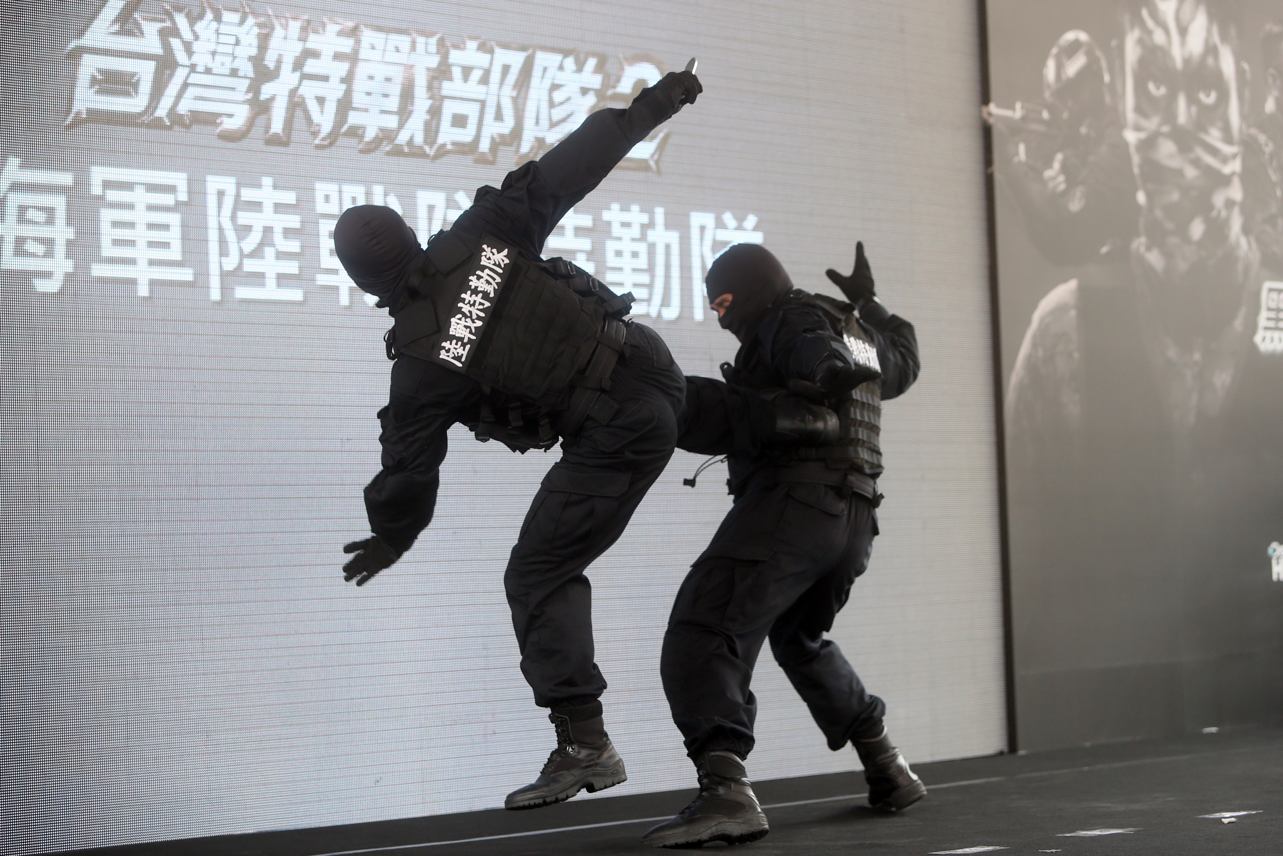 104年10月23日 馬英九總統出席《臺灣特戰部隊2》首映記者會暨體驗展